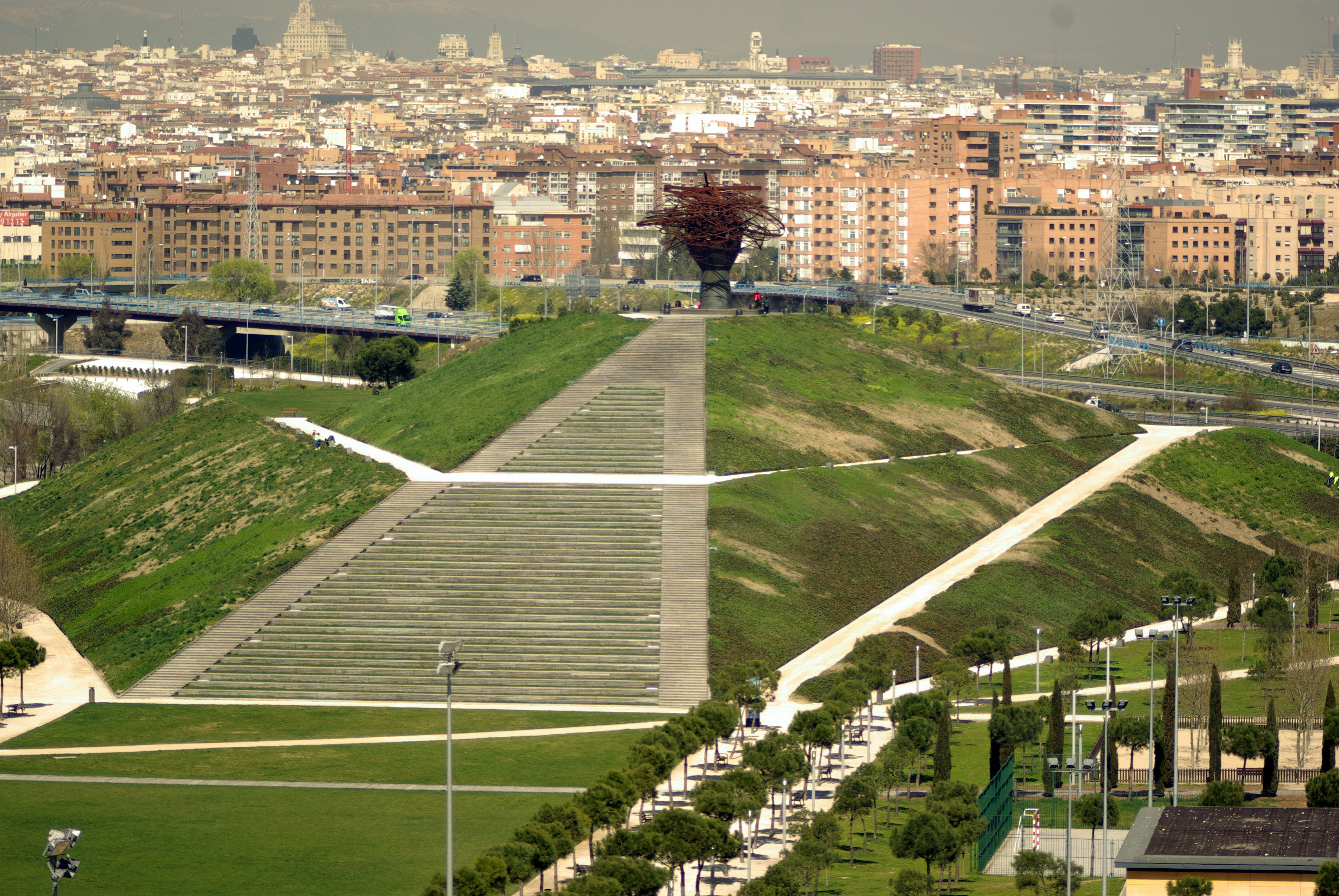 ® MADRID P.L.M. PARQUE MANZANARES PANO NOR-ESTE